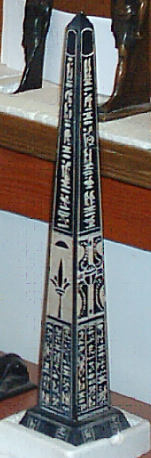 نموذج المسلة الفرعونية بالمتحف